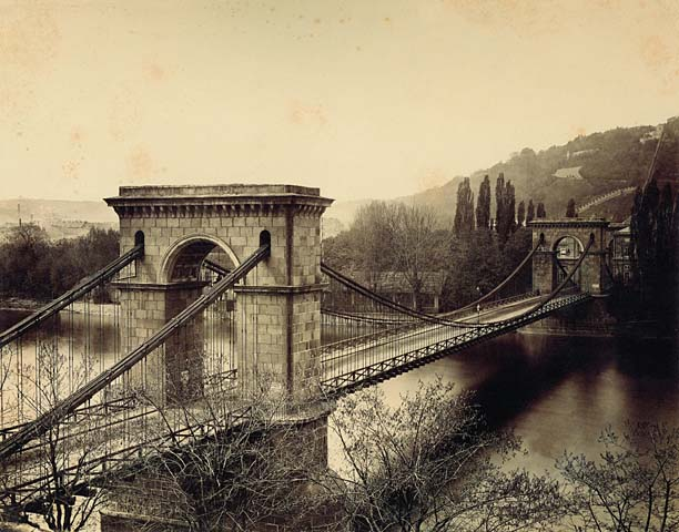 Řětězový most Františka Josefa I. v Praze, který stával na místě dnešního mostu Legií.